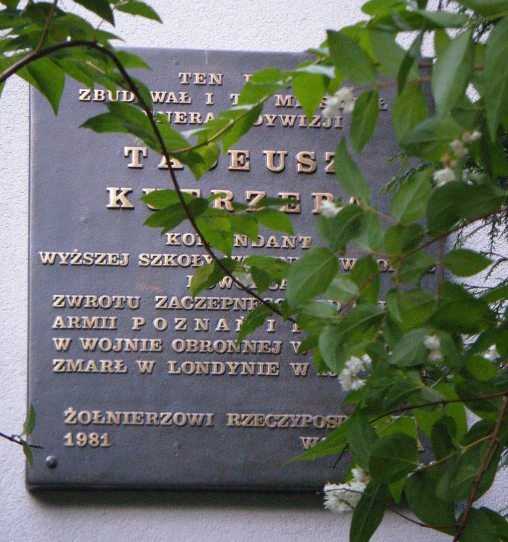 Tablica upamiętniająca gen. Tadeusz Kutrzebę. Warszawa, Saska Kępa, ul. Bajońska 3.